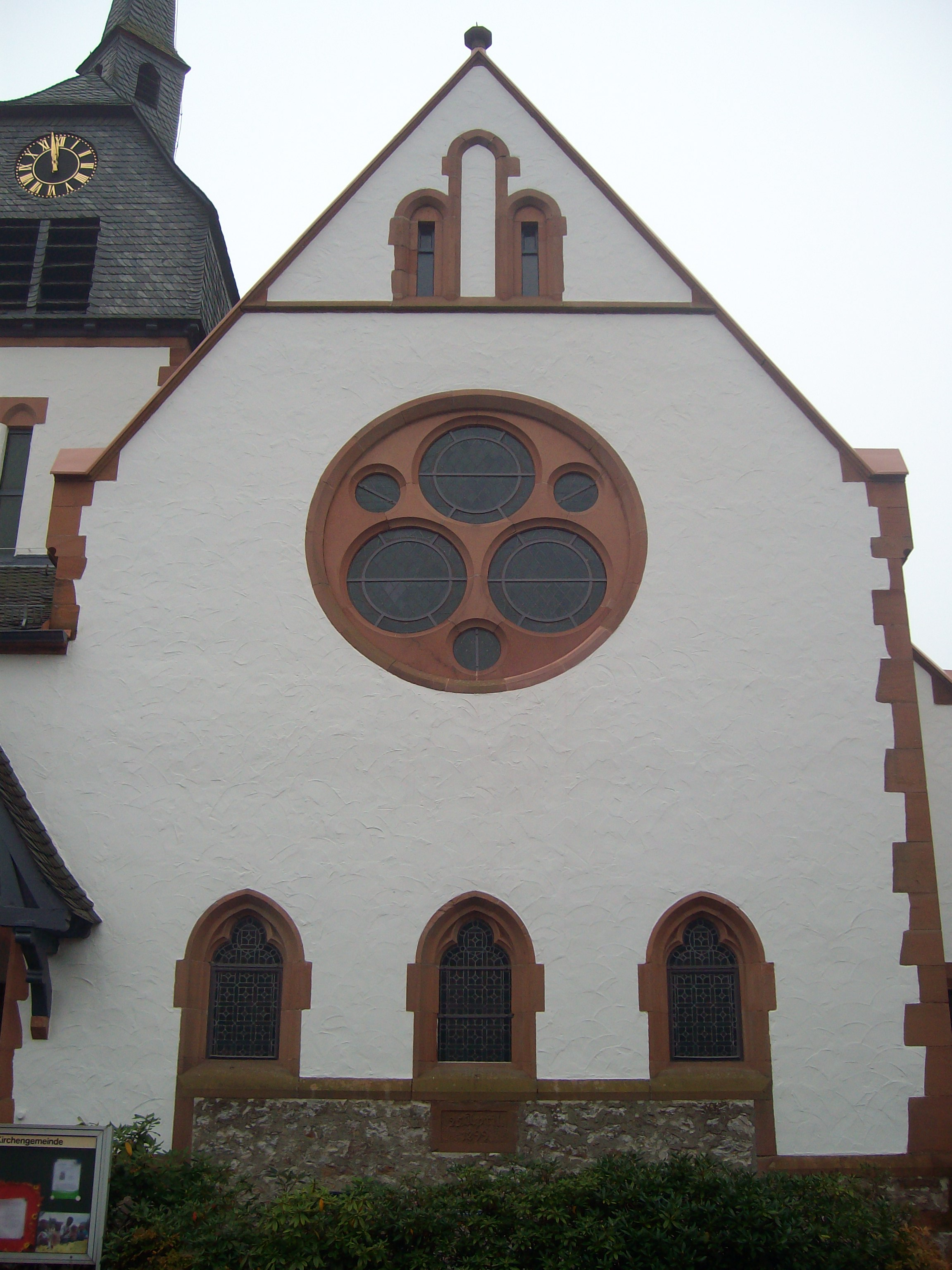 Evangelische Kirche Fellingshausen, Biebertal, Landkreis Gießen, Hessen, Deutschland